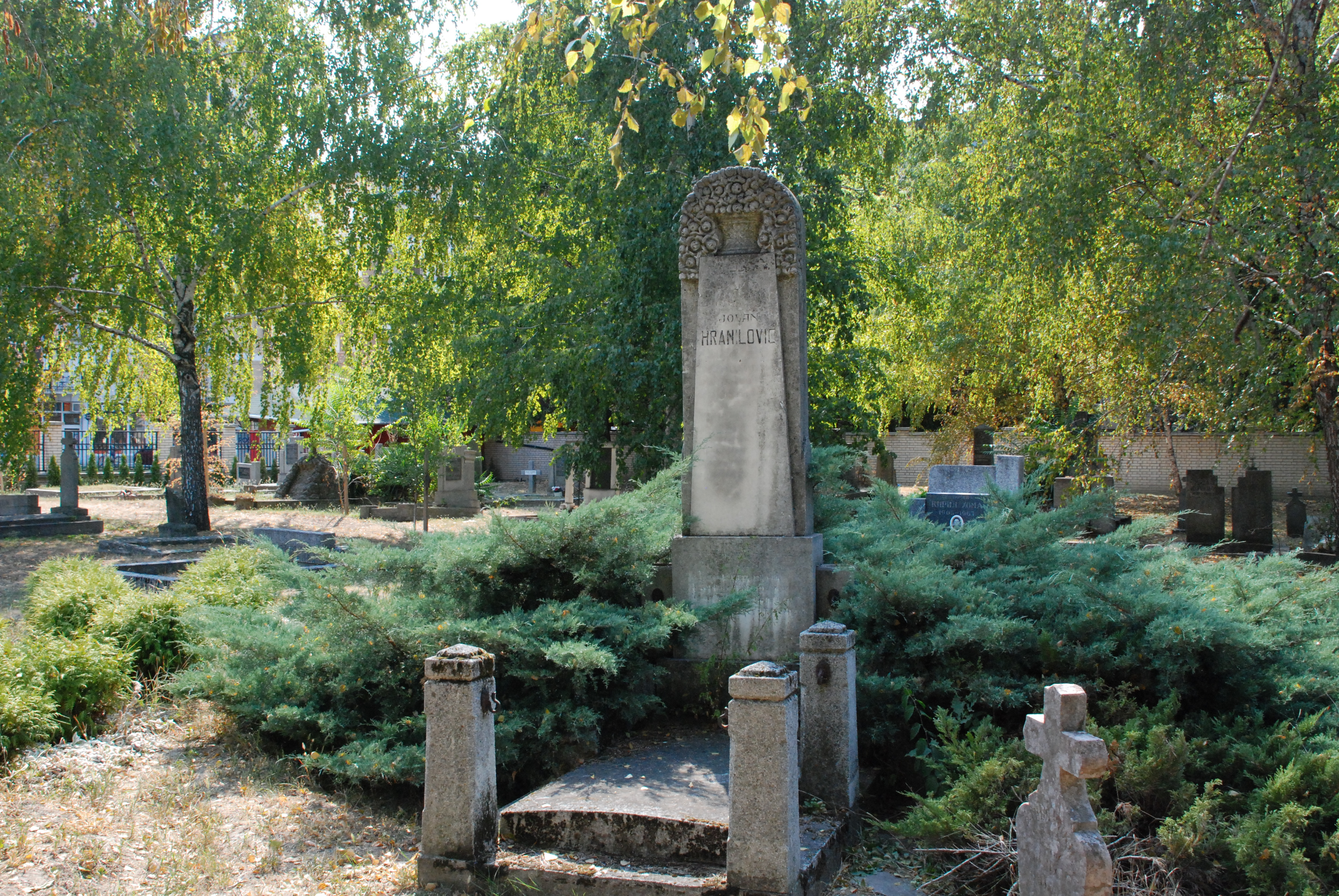 Grko-katolicko grblje okruzeno stambenim zgradama na Bulevaru kralja Petra I